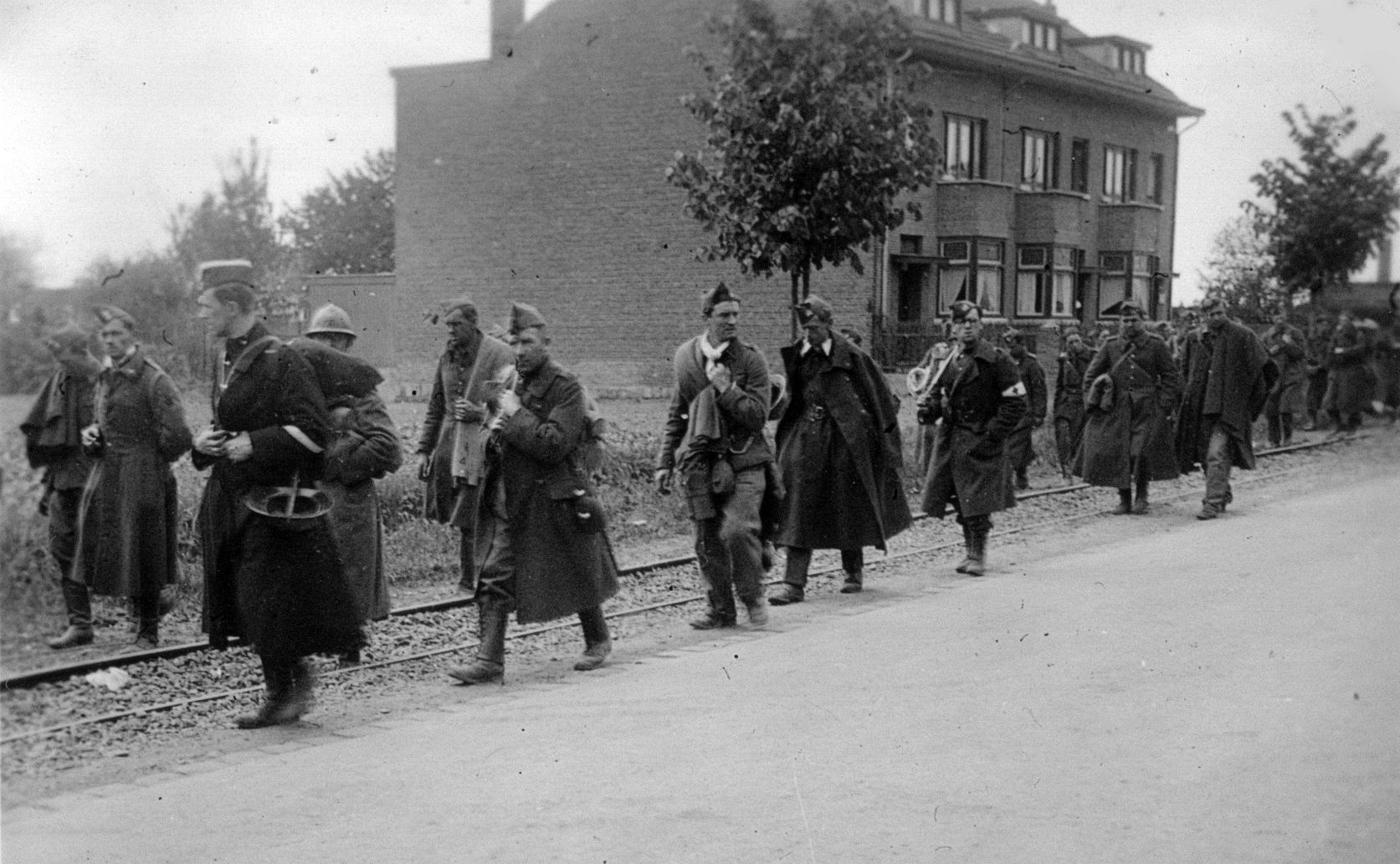 Bilder meines Großvaters, Laut Bildunterschrift "Gefangene vom berühmten Fort Eben-Emael